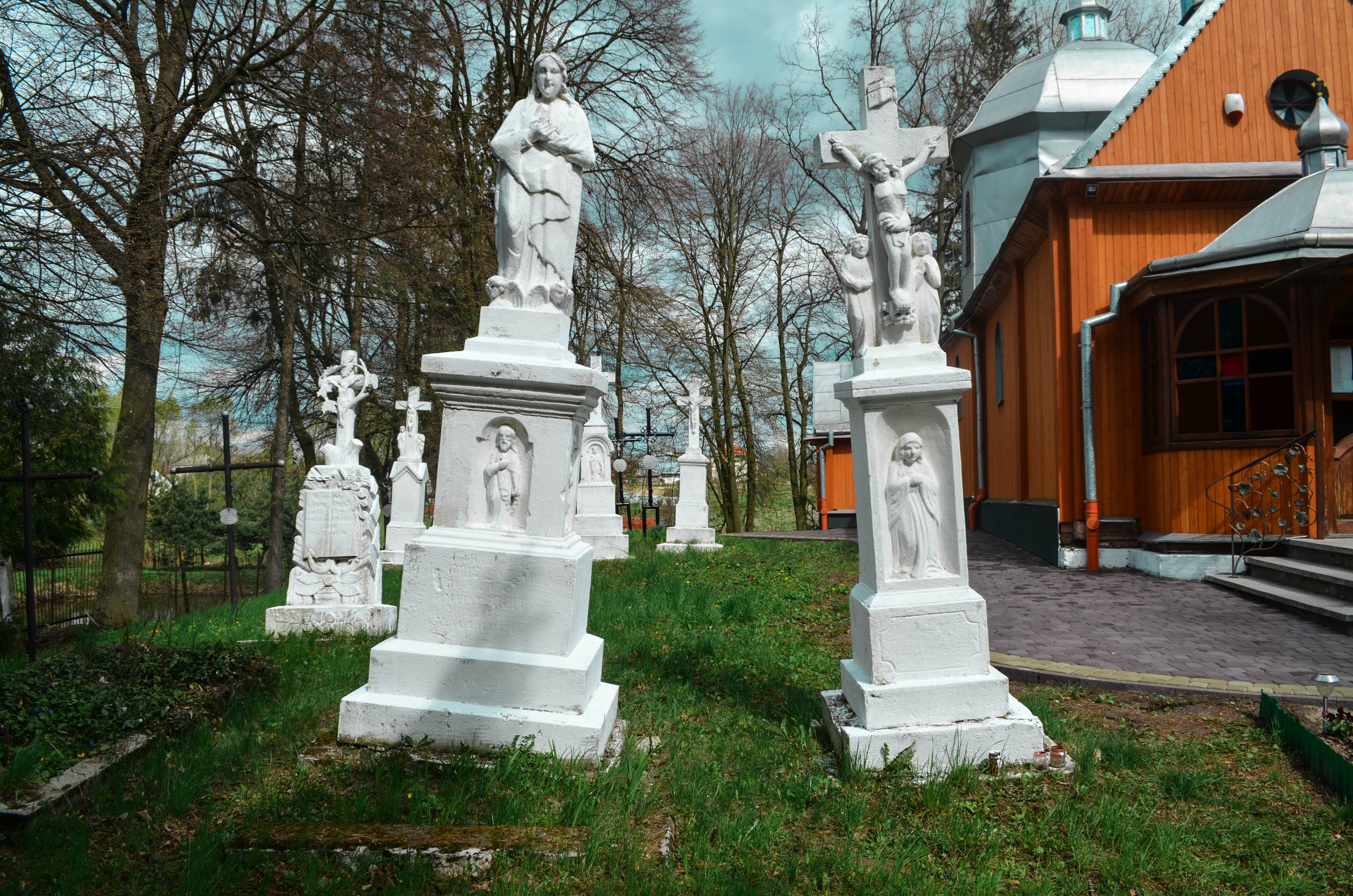 Могили на подвір'ї церкви Святого Василія Великого у Бартатові